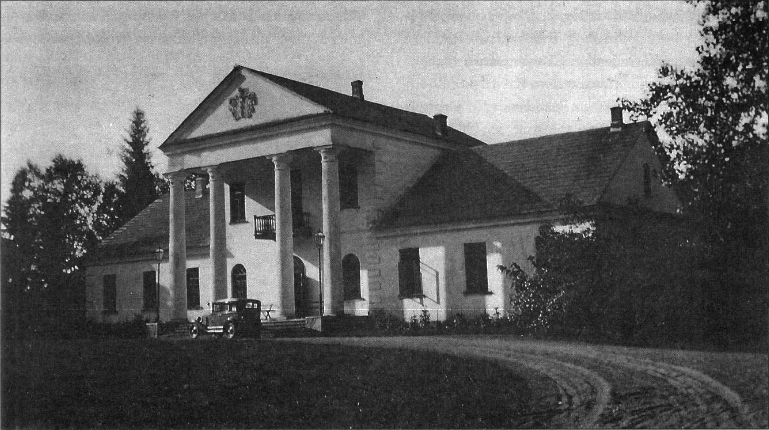 Беларуская (тарашкевіца): Мацькаўцы (Maćkaŭcy), сядзіба Багдановічаў (Bahdanovič)